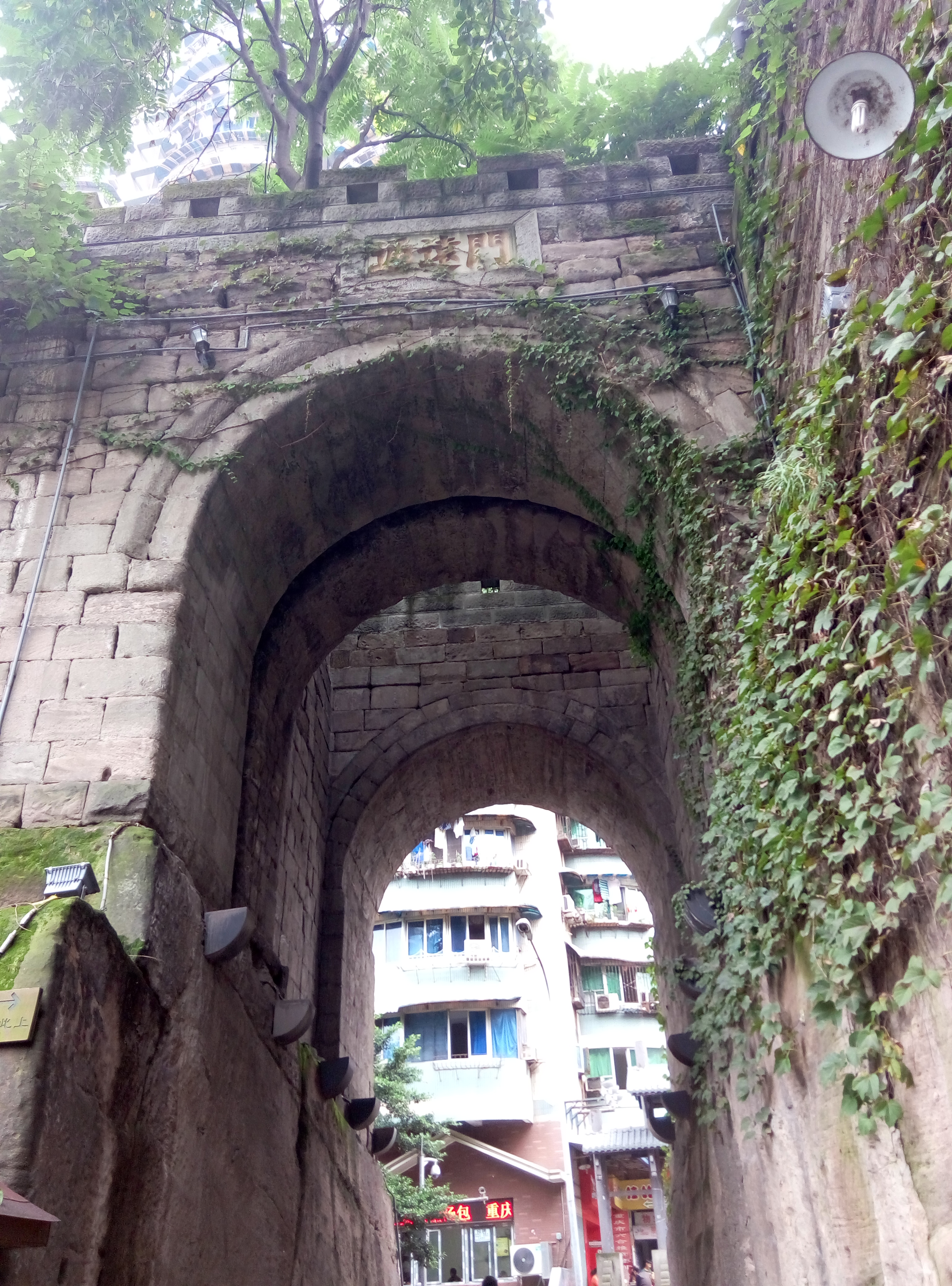 粵語: 重慶通遠門